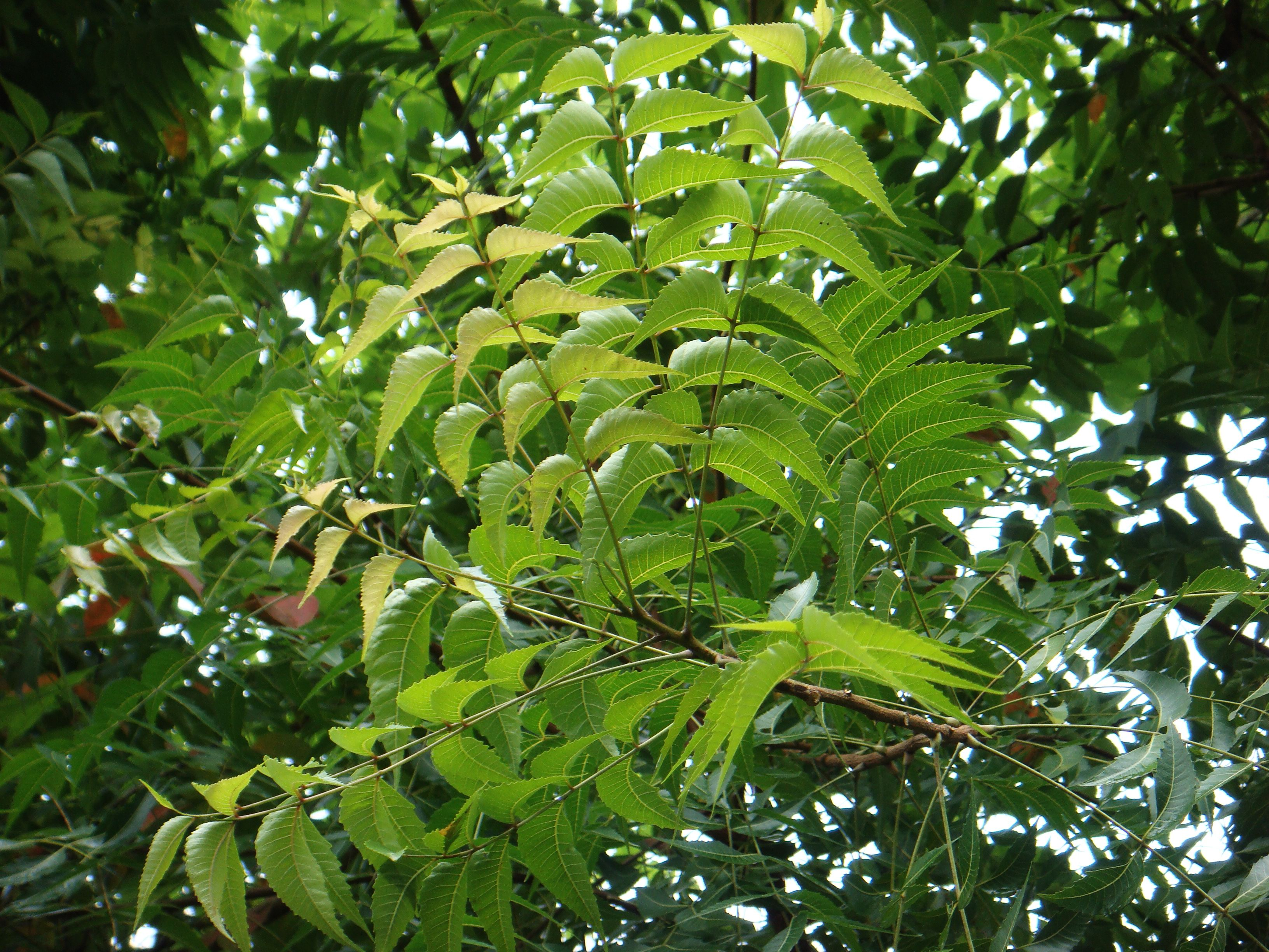 ആര്യവേപ്പ്